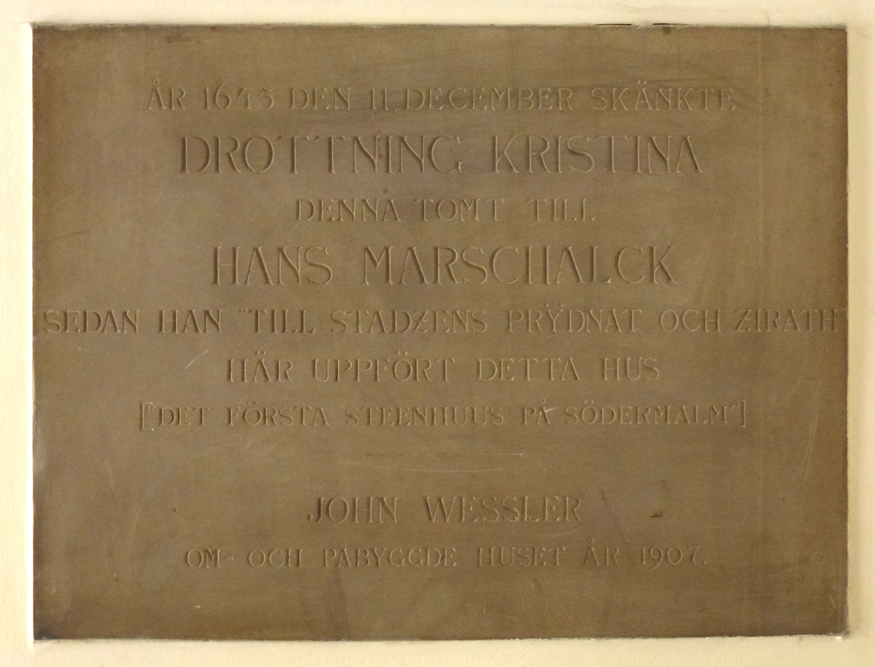 Minnestavla i Hans Marschalcks hus (ingång Hornsgatan 4)